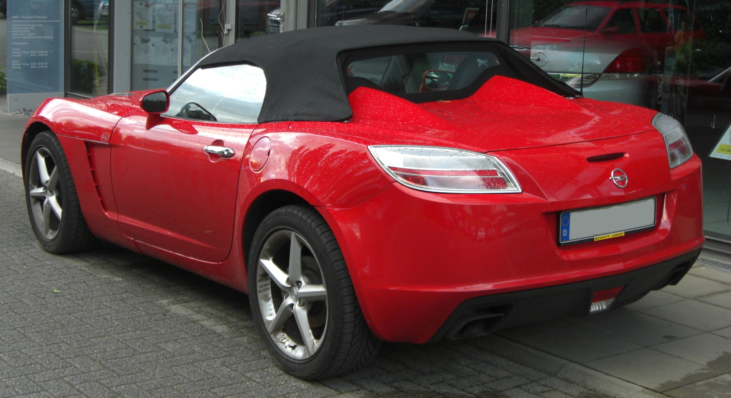 Opel GT